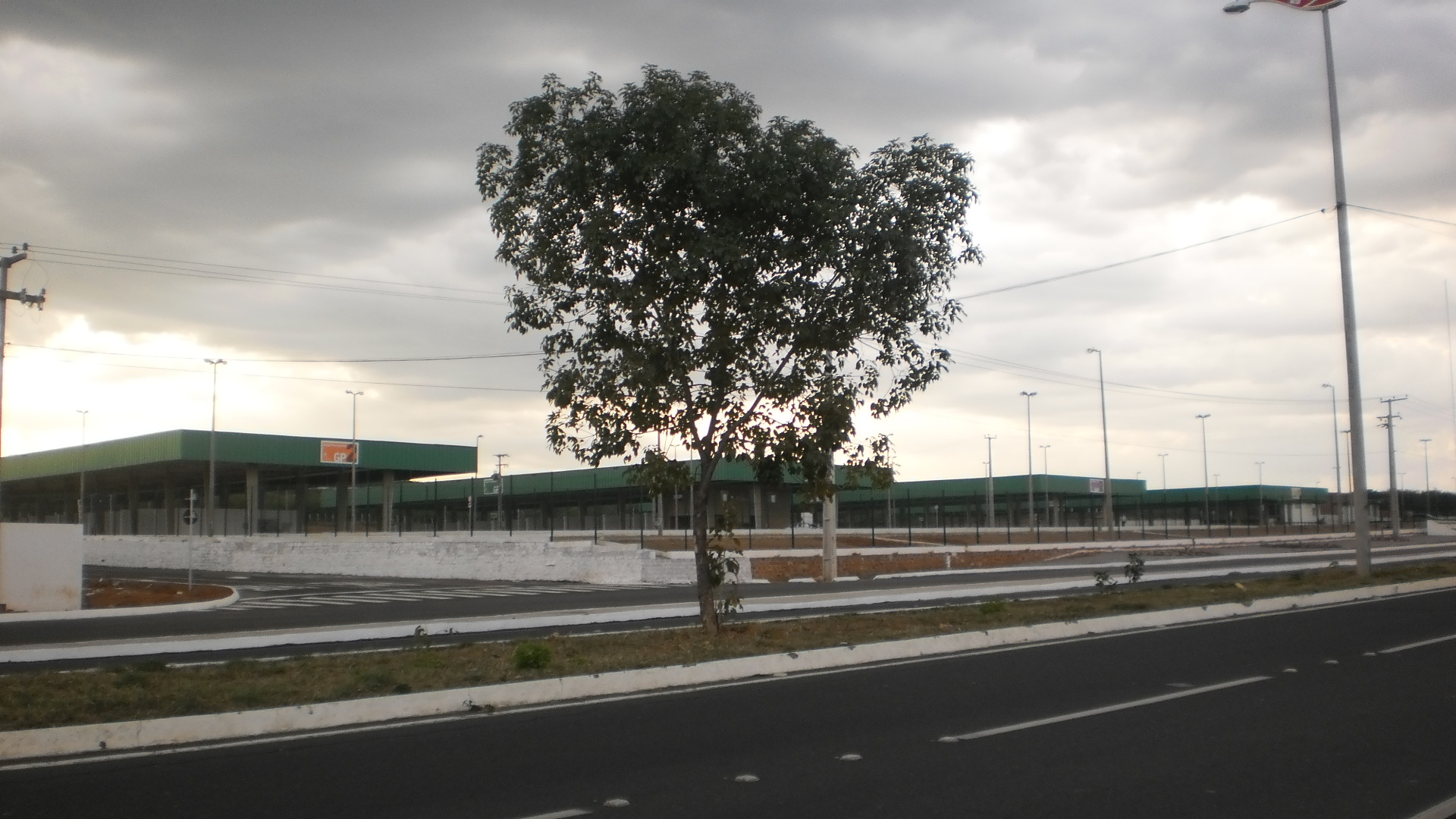 Ceasa Cariri - Barbalha